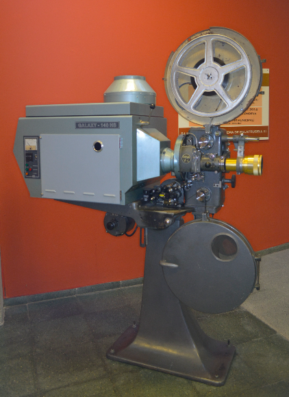 Imatge d'un projector del cinema Garbí (fons Cine Club Garbí)